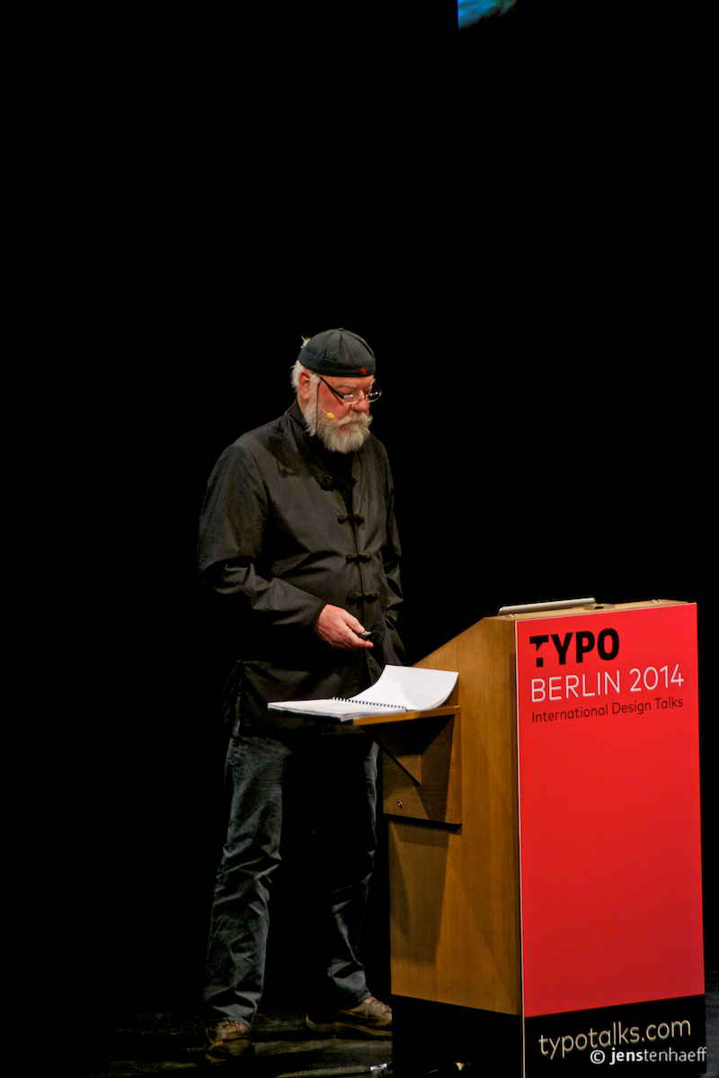 Roger Law